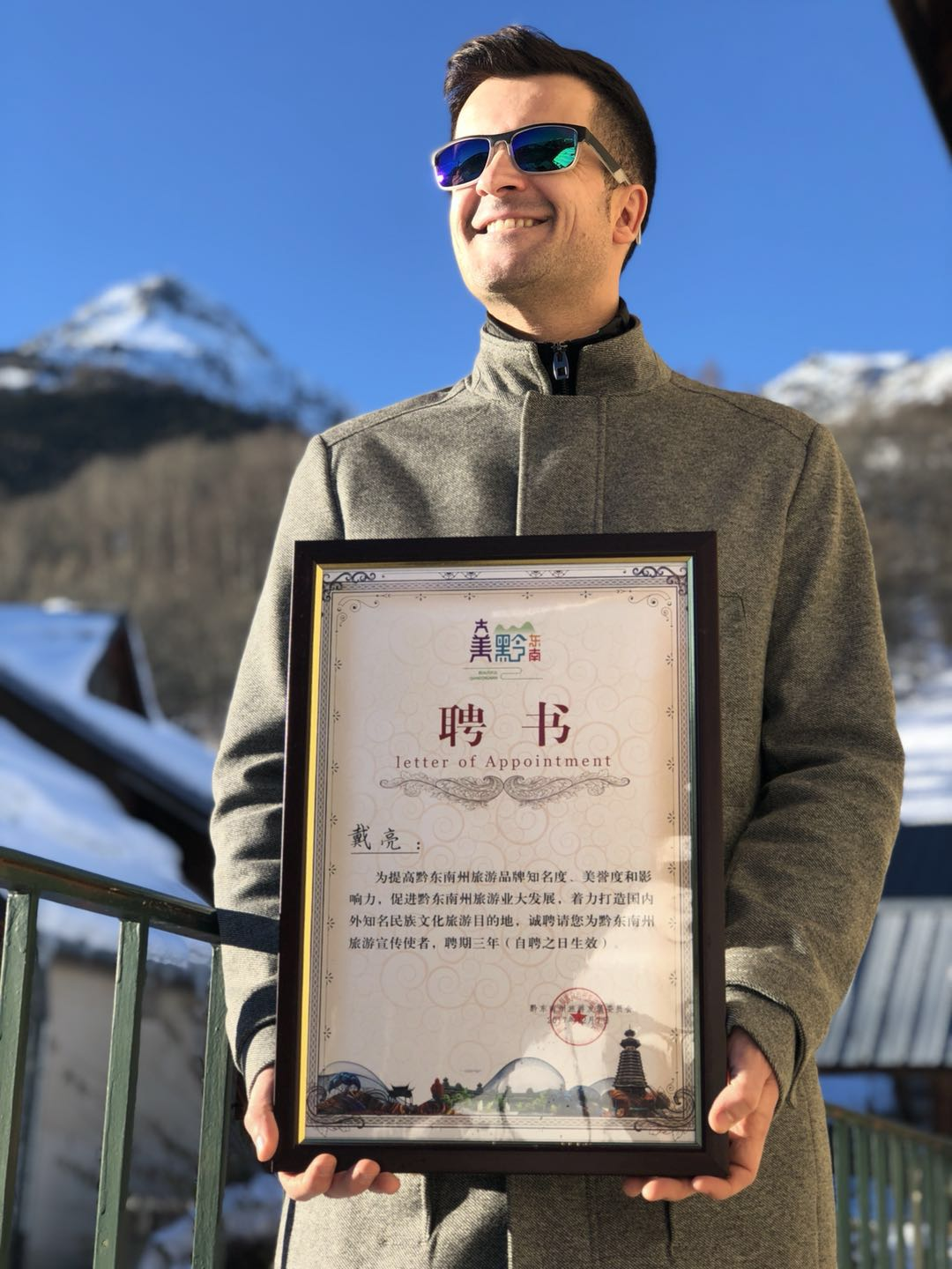 Dantès Dai Liang dans les Alpes Françaises en décembre 2017(Saint Colomban des Villards) pose avec un document officiel du gouvernement du Qiandongnan, Chine